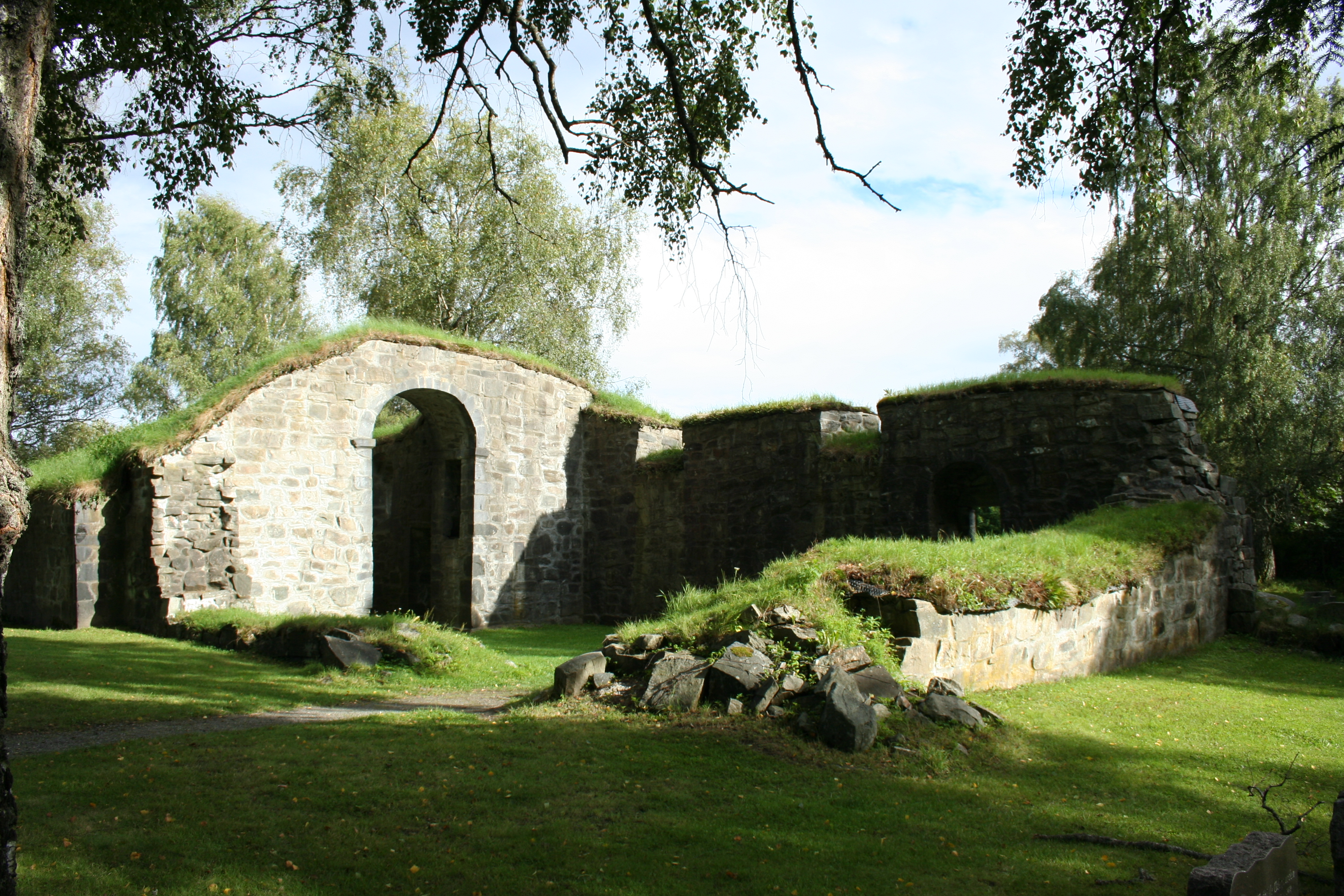 bamble kirke